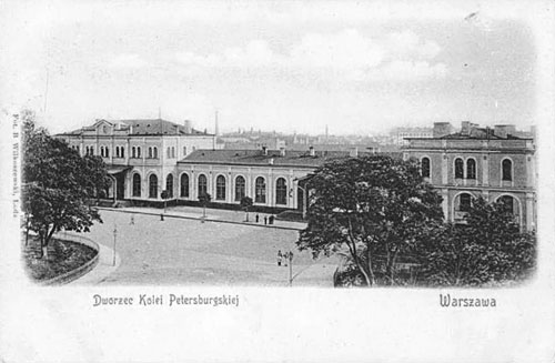 Warszawa Dworzec Petersburski before 1915